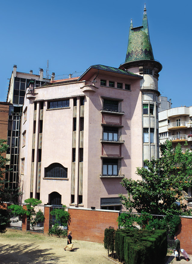 Casa Teixidor. La Punxa